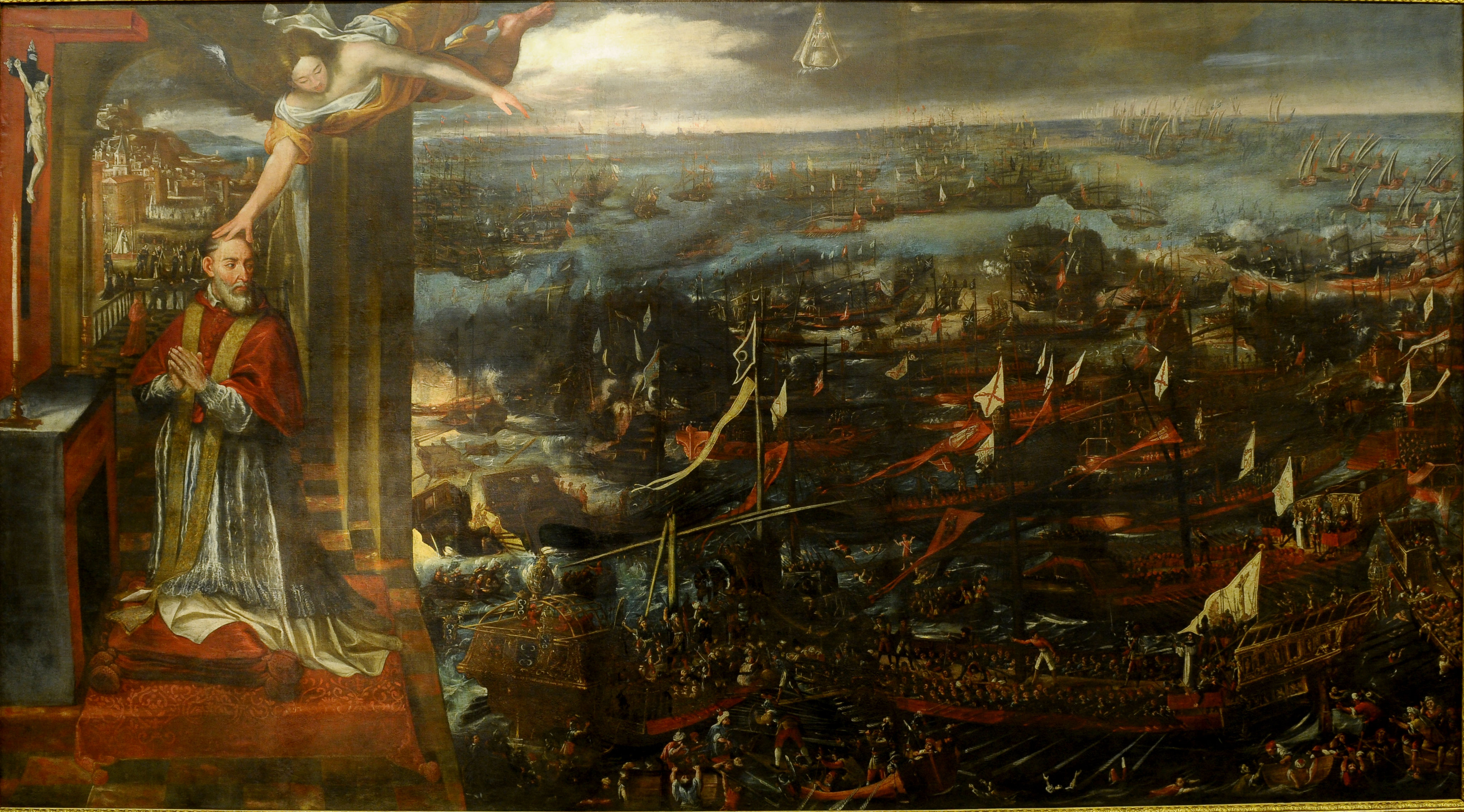 A la derecha se ve la batalla, a la izquierda Pio V rezando delante de un crucifijo un ángel le toca la cabeza y le anuncia la victoria, al fondo a través de la ventana se ven las procesiones que se hacían en la ciudad. En el cielo aparición de la Virgen.